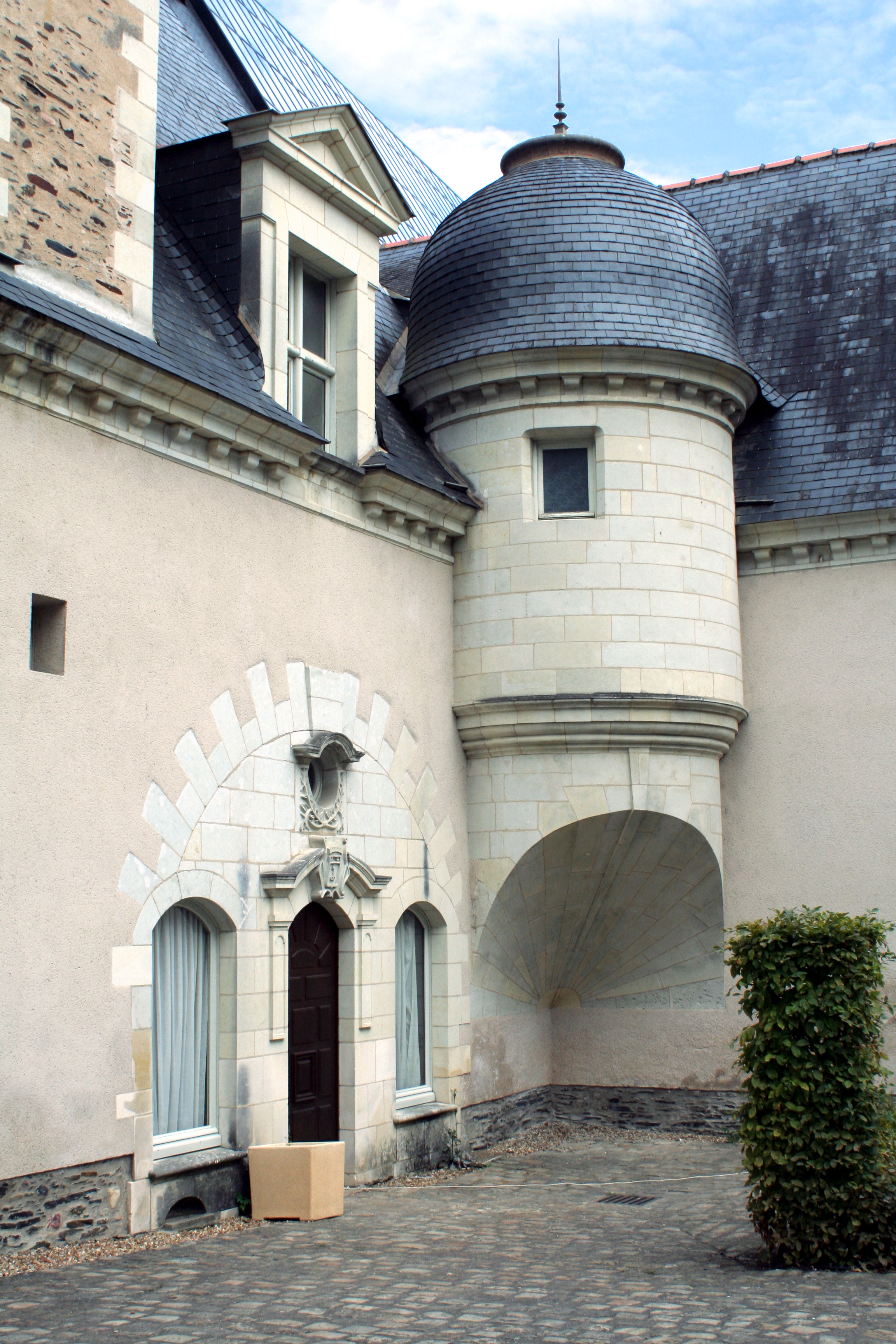 Tourelle en surplomb sur trompe appareillée en panache, derrière le cloître de l'abbaye Toussaint d'Angers. .